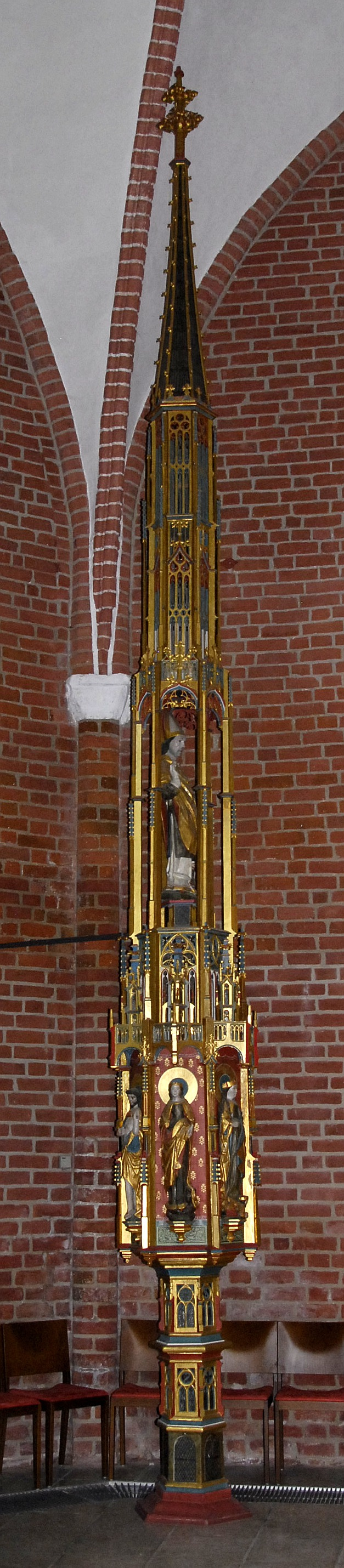 Sakramentsturm der St. Johanniskirche in Petersdorf auf Fehmarn